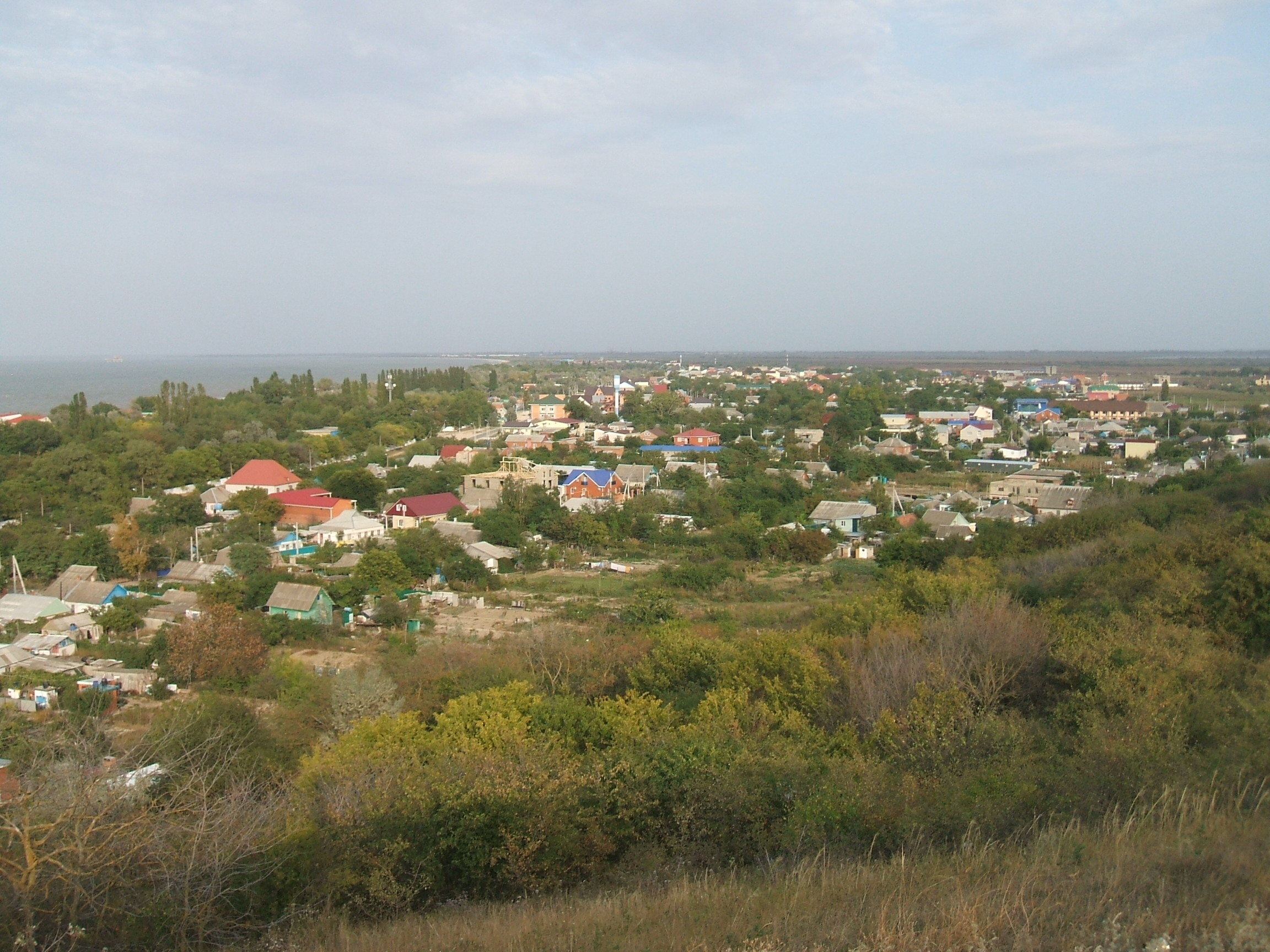 Вид на станицу Голубицкую